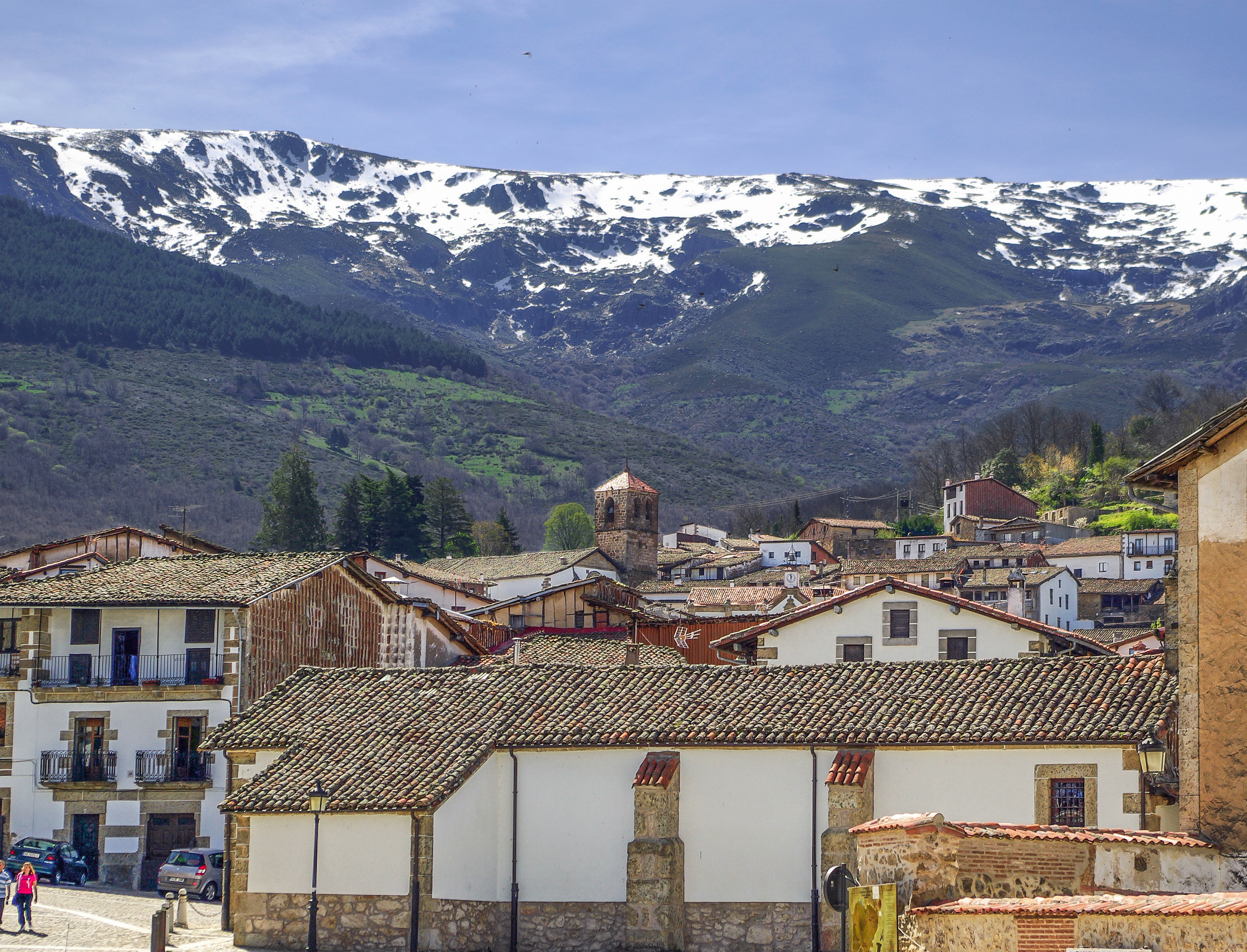 Candelario